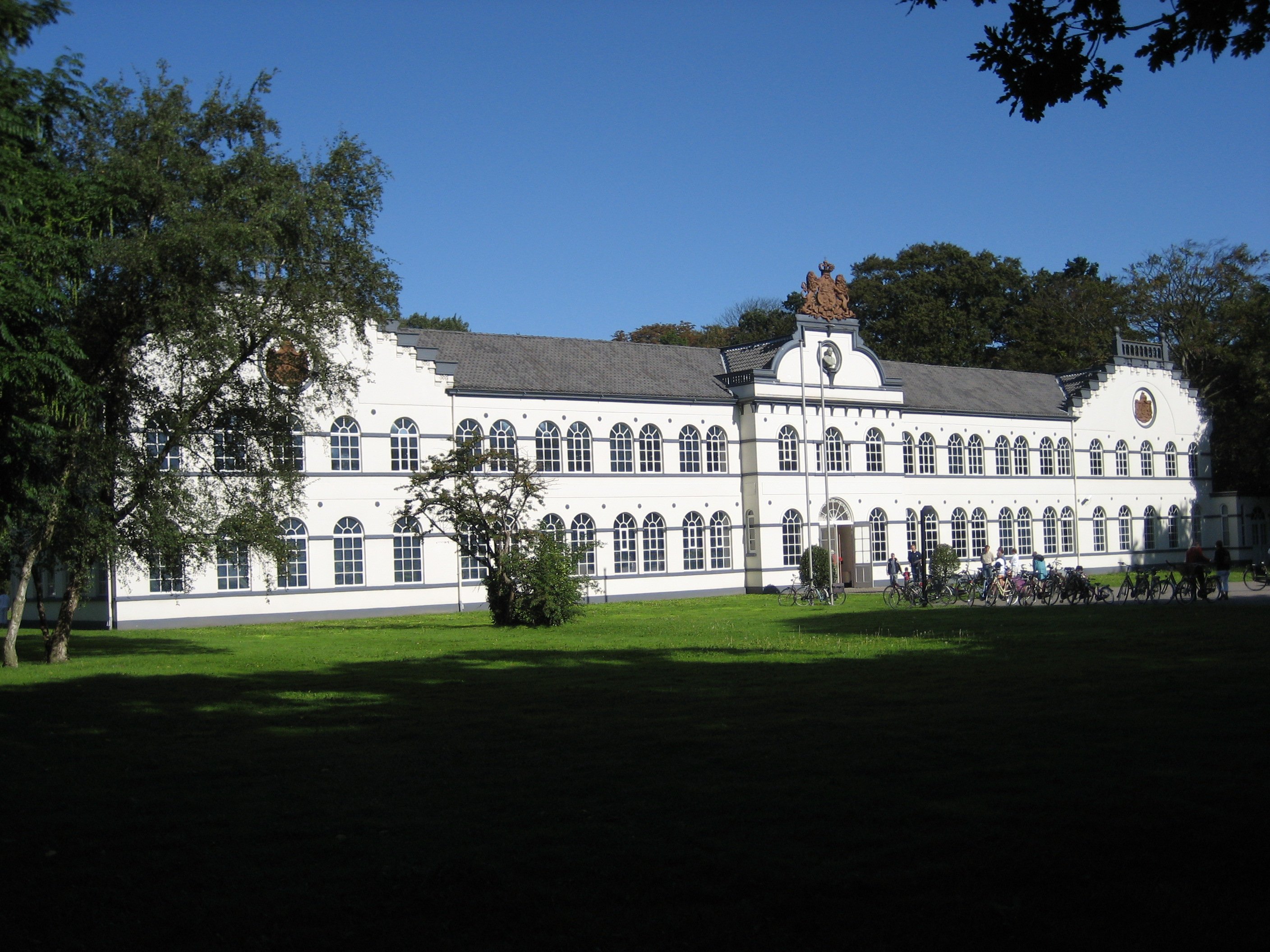 De klassieke voorzijde van het gebouw. Zie voor de achterzijde thumb|left.